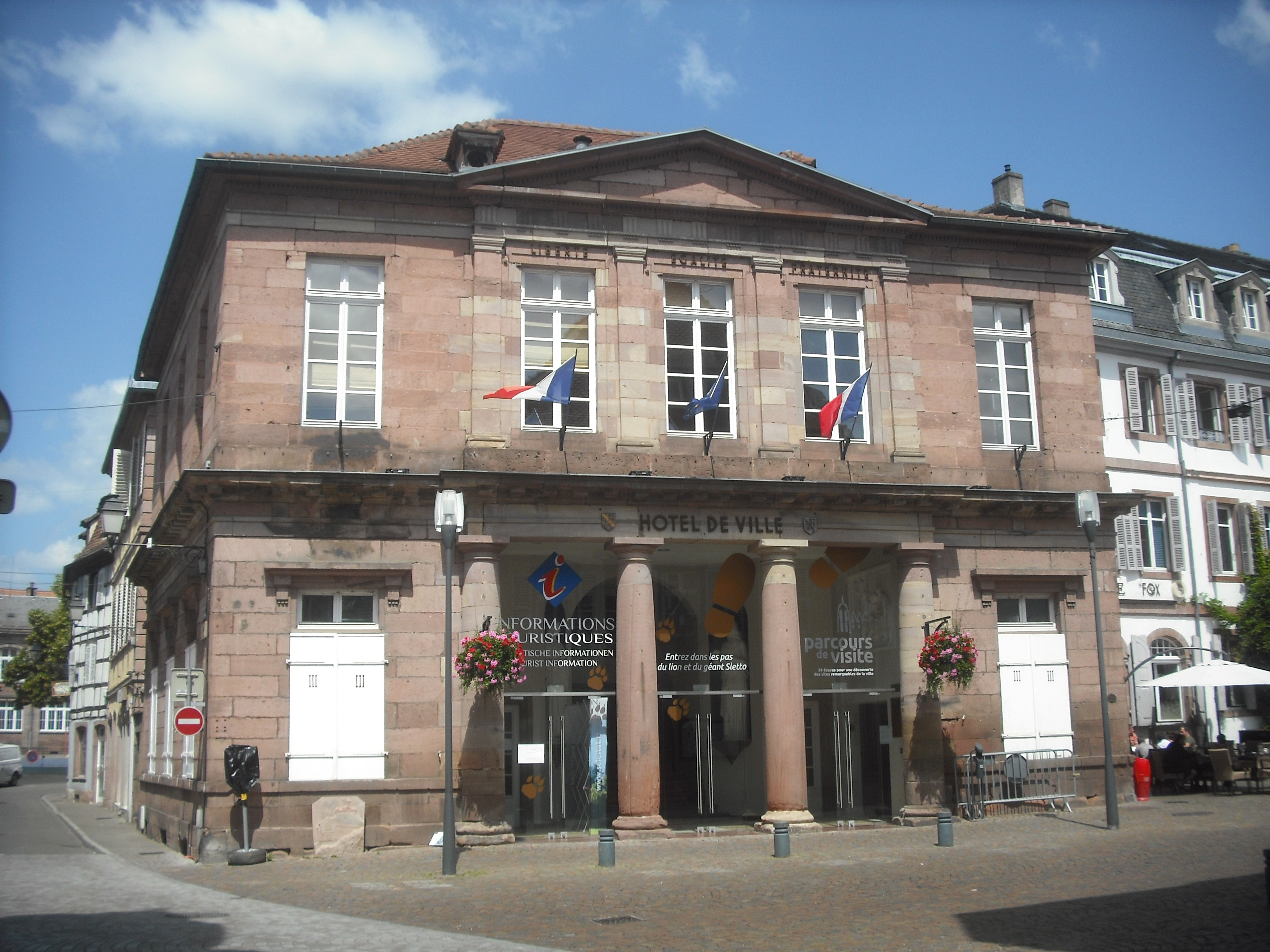 Hôtel de ville de Sélestat, Bas-Rhin, France.